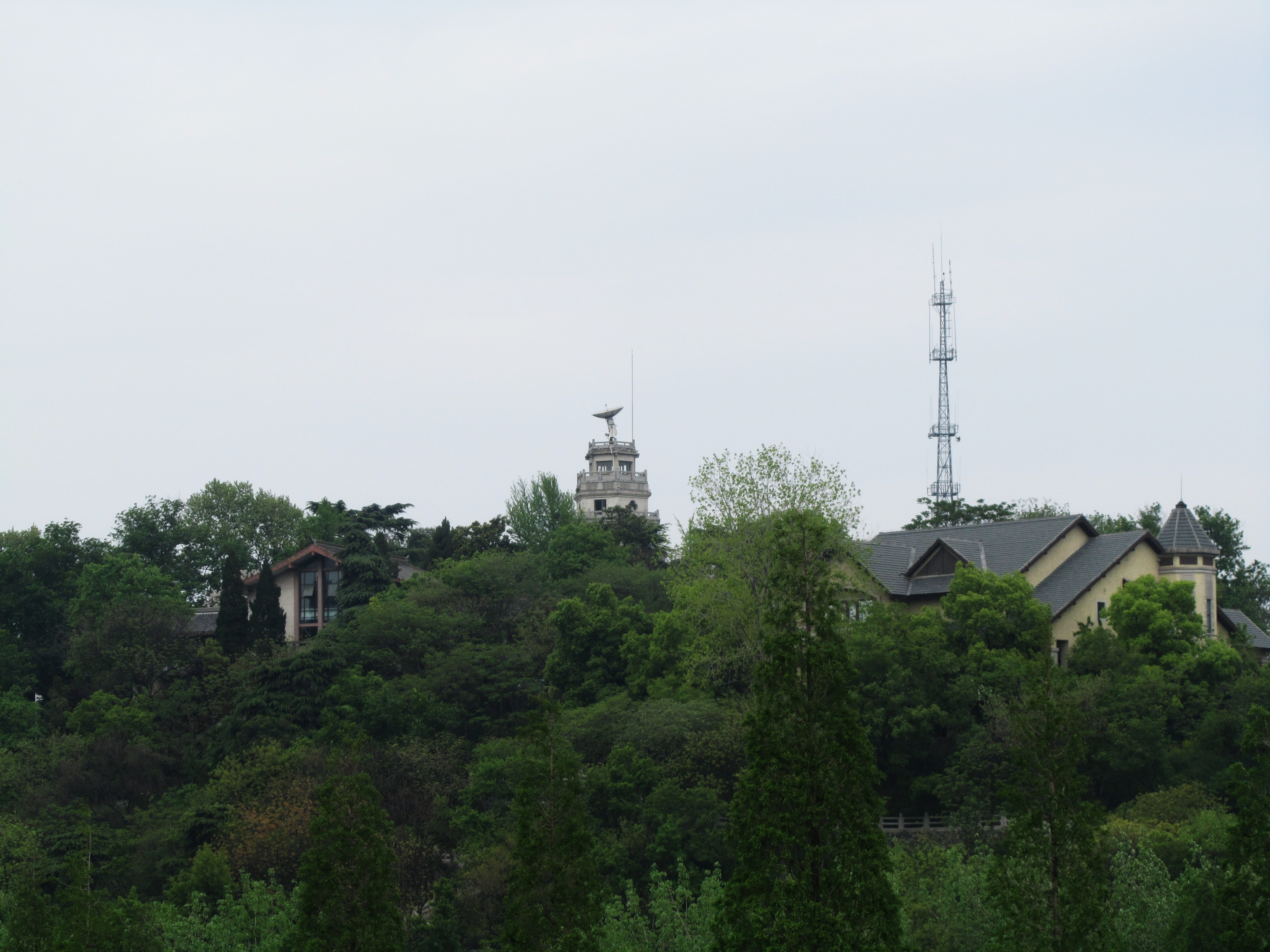 自东南大学留榴园宾馆望北极阁气象台旧址。